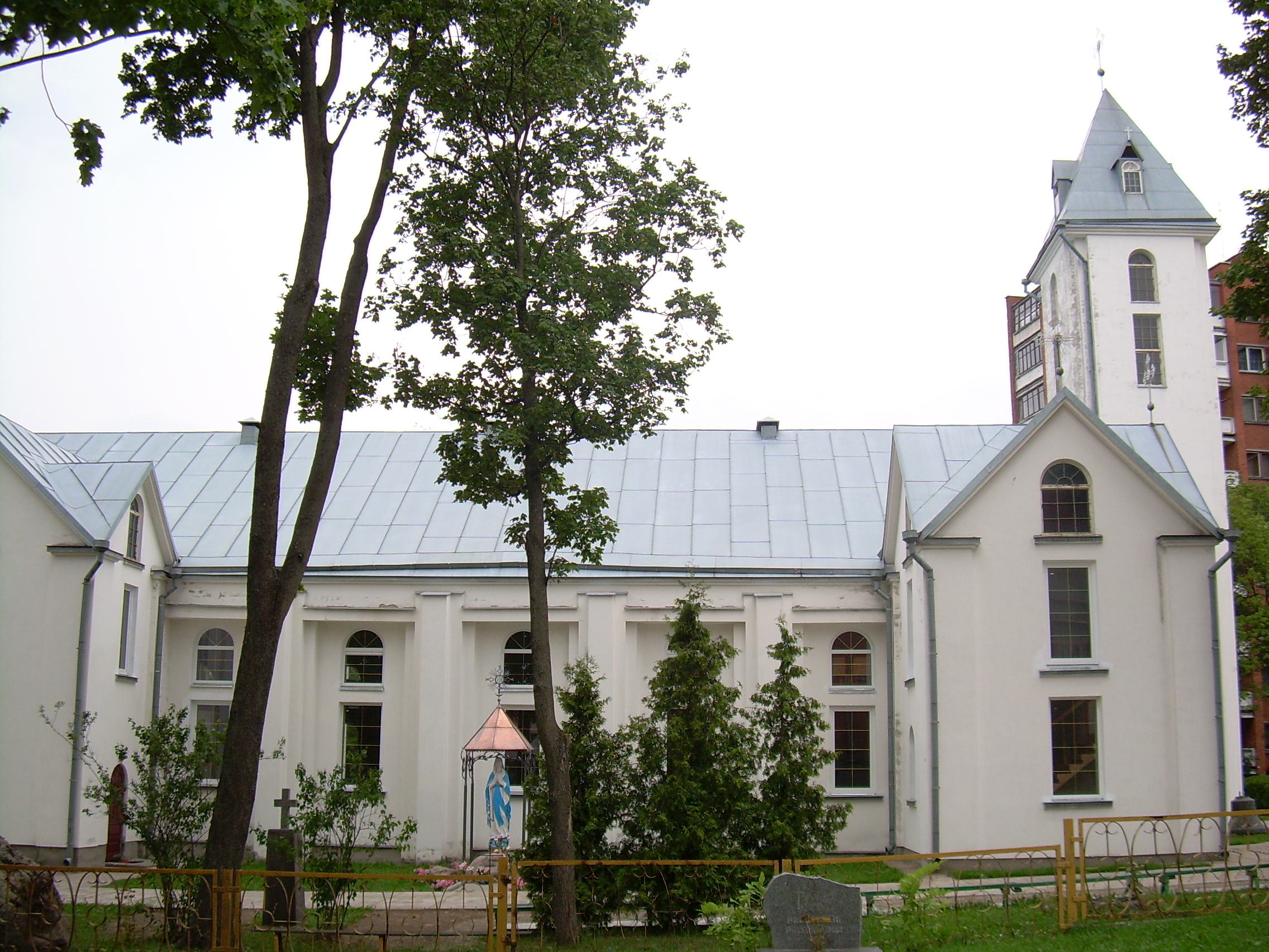 Radviliškio Švč. Mergelės Marijos Gimimo bažnyčia